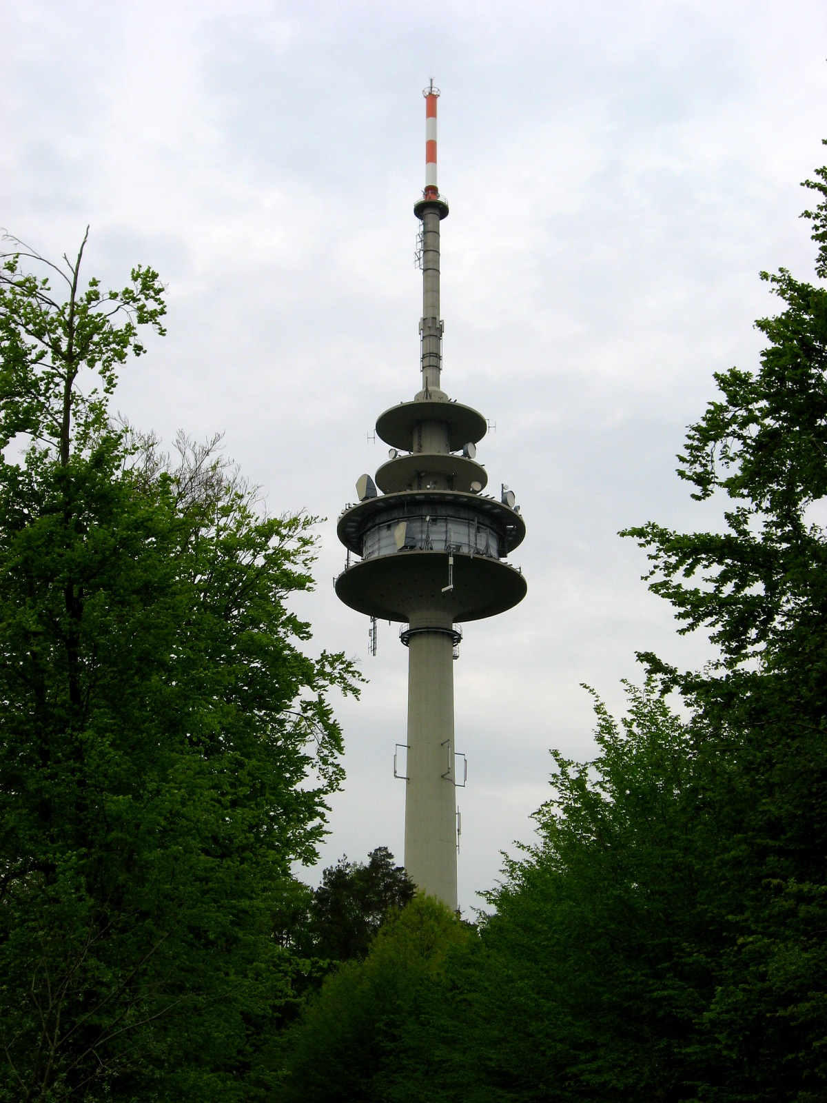 Fernmeldeturm Heretsried bei Augsburg, Ansicht aus Richtung Ost